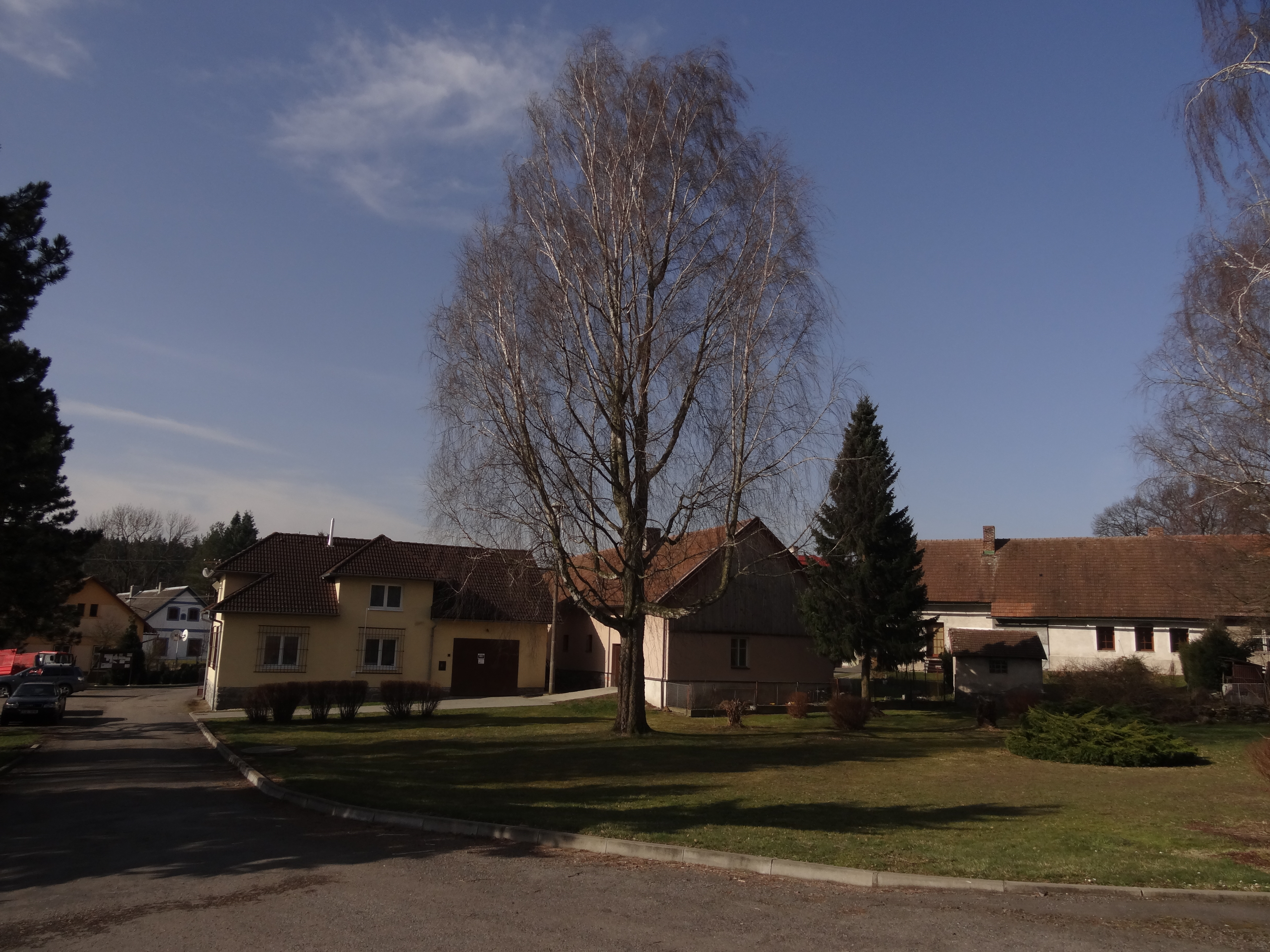 Jeřišno - střed vsi (strom za obecním úřadem)